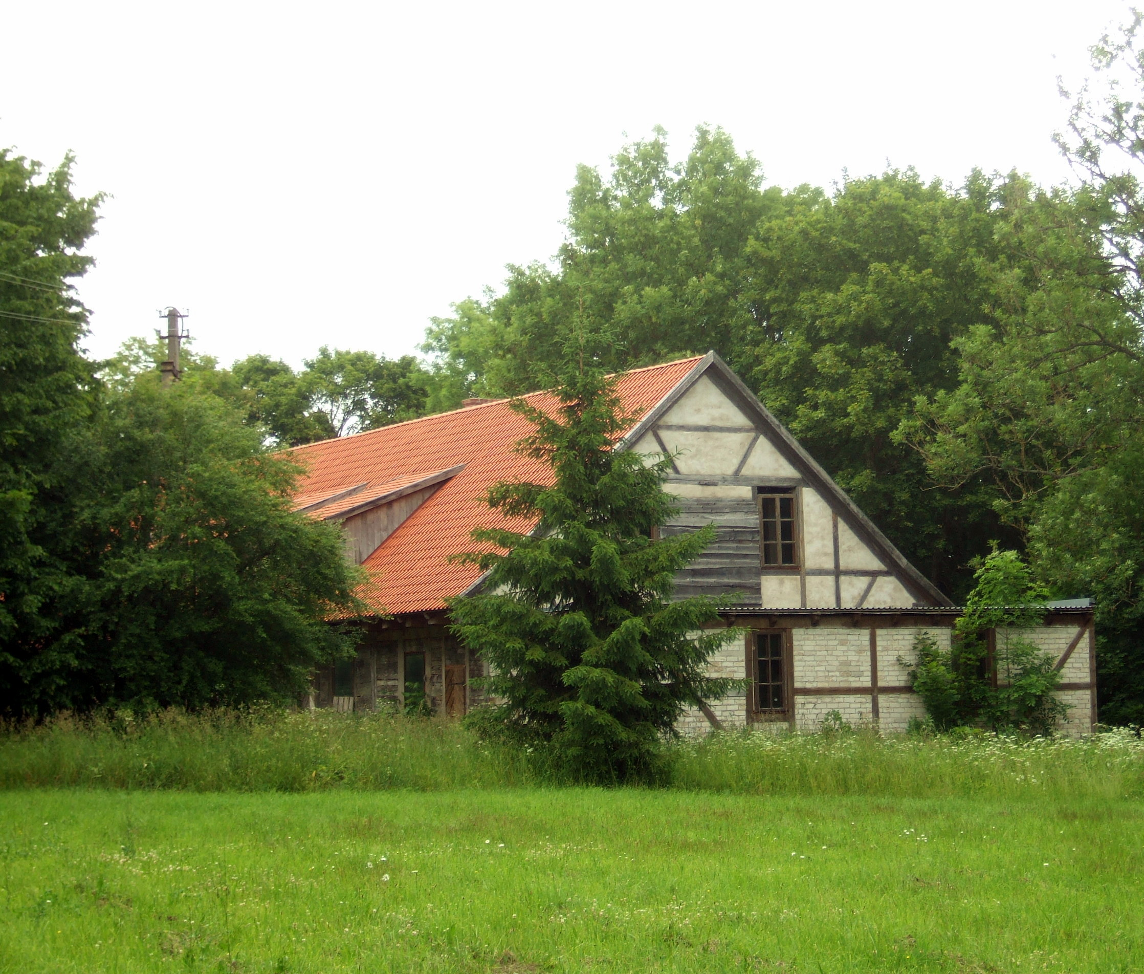 Laukžemės dvaro svirnas